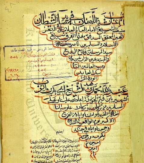 الصفحة الأولى من مخطوطة لكتاب إغاثة اللهفان من مصايد الشيطان لابن القيم، محفوظة في جامعة الرياض، تعود لسنة 1285 هـ